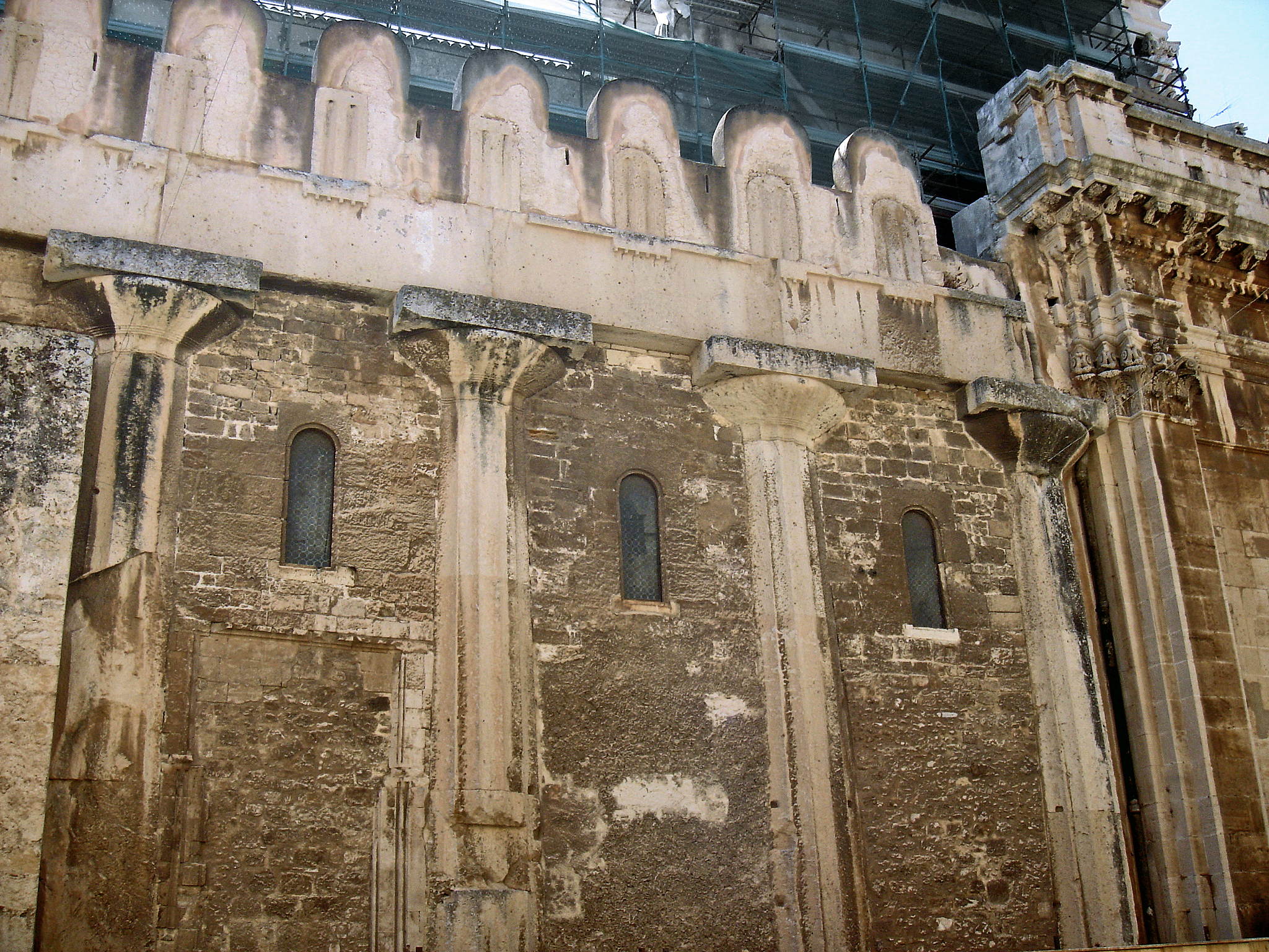 Vista lateral de la catedral de Siracusa.